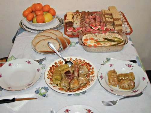 Sarma